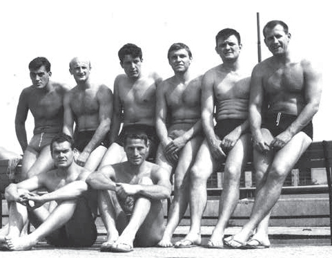 Mladost waterpolo team in Zagreb. Left-right. Standing: Ozren Bonačić, Marijan Verži, Mladen Jonke, Zdravko Hebel, Milan Jeger, Marijan Žužej. Sitting: Karlo Stipanić and Zlatko Šimenc